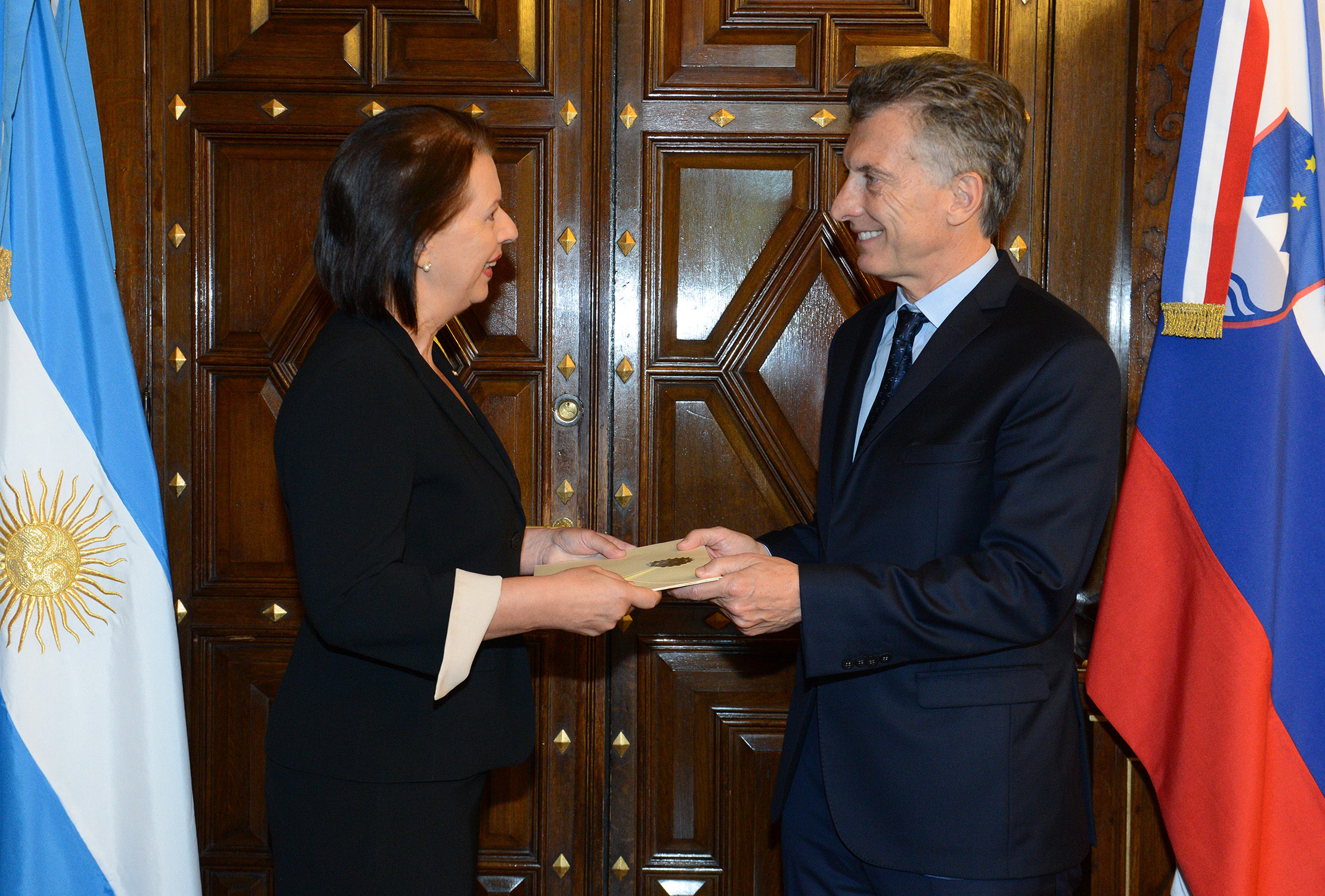 El presidente Mauricio Macri recibió ayer las cartas credenciales de los embajadores de Rumania, Noruega, Eslovenia, Polonia, Serbia, Nueva Zelandia y de la Unión Europea. El acto se realizó este mediodía en el despacho presidencial, donde también asistió la canciller Susana Malcorra. Presentaron sus cartas Carmen Liliana Podgorean (Rumania); Jostein Leiro (Reino de Noruega); Jadranka Šturm Kocjan (Eslovenia); Marek Pernal (Polonia); Jela Bacovic (Serbia); Raylene Liufalani (Nueva Zelanda) y José Ignacio Salafranca (Delegación de la Unión Europea).